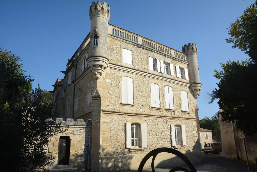 Le Château de Cabrières